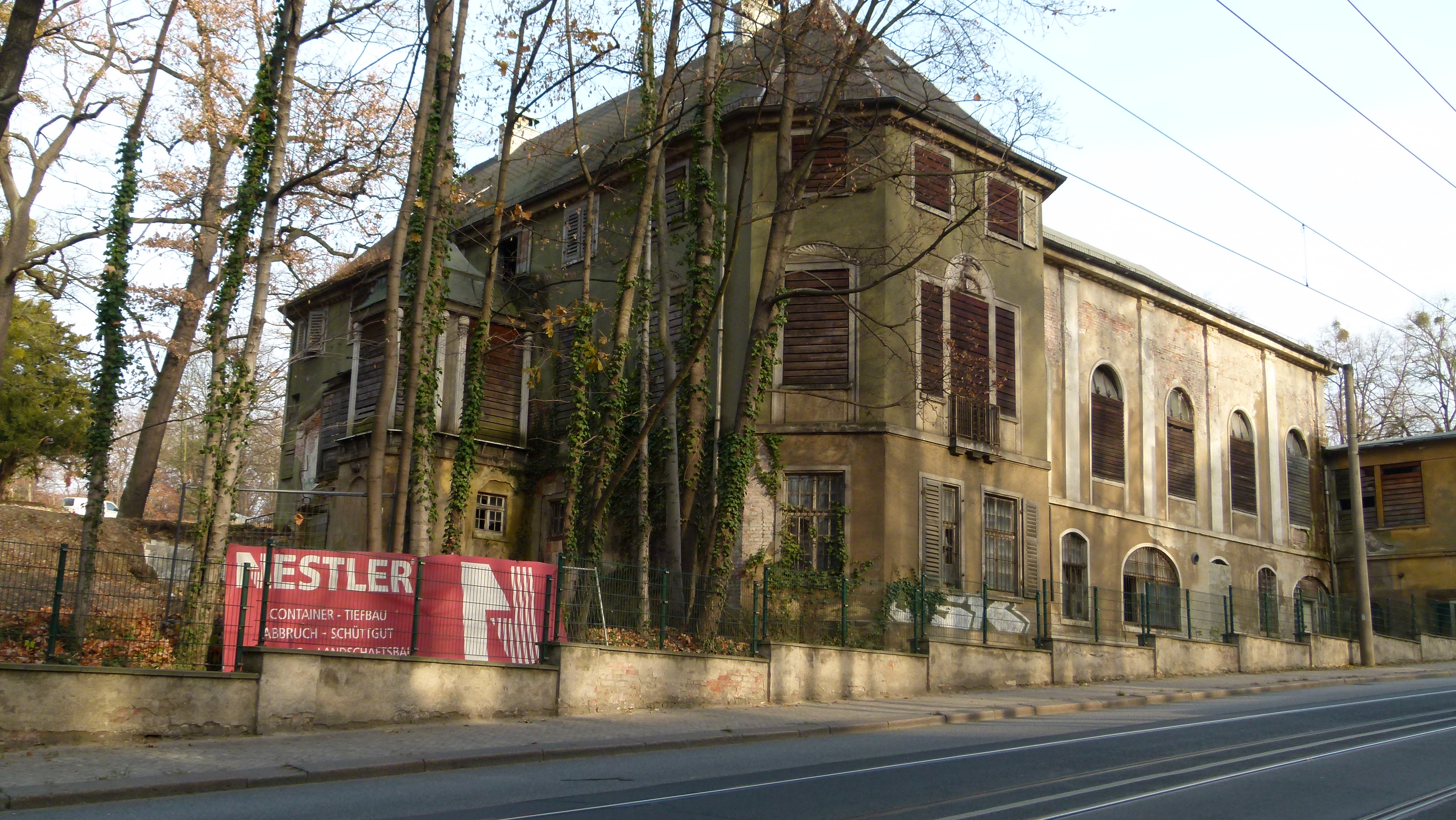 Lahmann-Sanatorium auf dem Weißen Hirsch, Dresden - ehem. Gesellschaftshaus und Speisesaal.